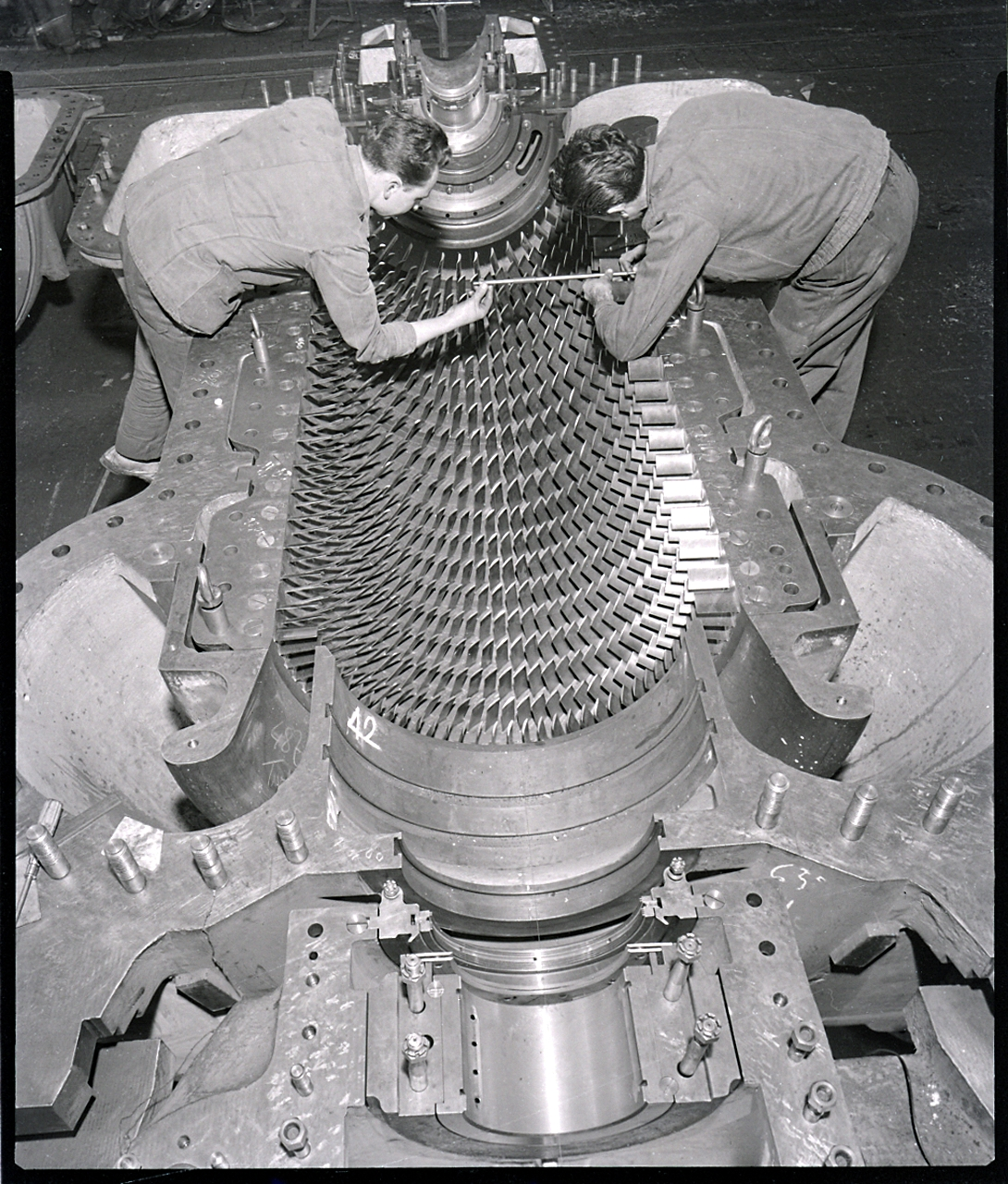 Servizio fotografico : Milano, 1969 / Paolo Monti. - Buste: 3, Fototipi: 6 : Negativo b/n, gelatina bromuro d'argento/ pellicola ; 10x12. - ((Serie costituita da 3 buste sciolte di negativi identificati con i nn.: 19162, 19163, 19164, 19165, 19166, 19167. - Sulle buste iscrizioni didascaliche manoscritte a penna e pennarello. - Sul coperchio della scatola manoscritto a pennarello: "Solvay". - Confronta scheda GC00694-708. - Fonte: Rubrica di Paolo Monti: Archivio 10x12 (ultimi numerati) - dal G1 al (s.d.), presso Archivio Paolo Monti